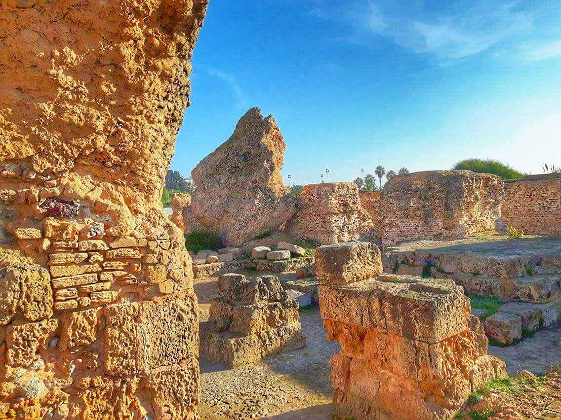 ألتقطت هذه الصورة في تونس وهي تمثل"حمامات أنتونيوس" التابعة للحظارة القرطاجية وهي تقع حاليا في مدينة تونس بقرطاج حنبعل